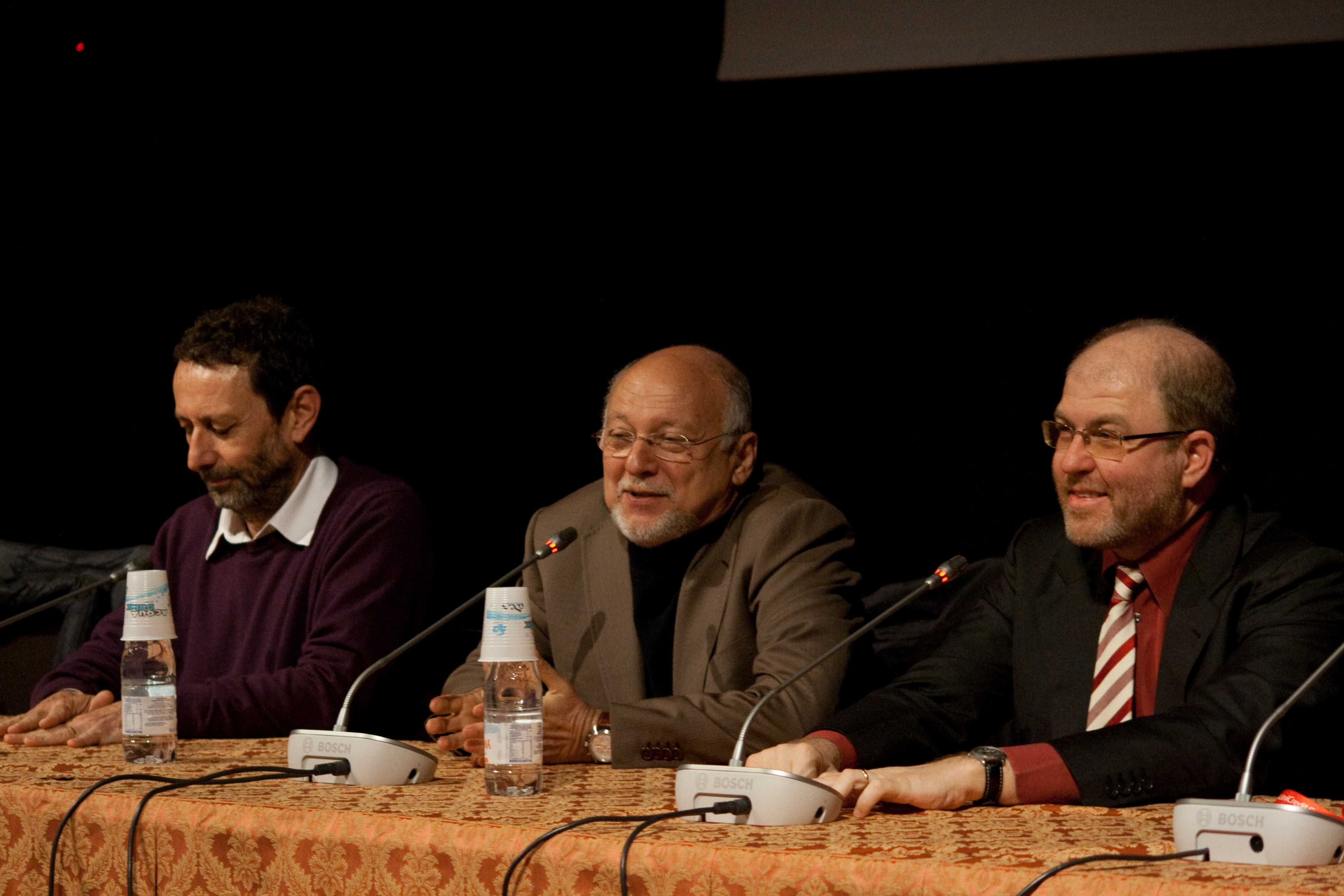 Il caratteraccio: Discussione pubblica sugli italiani - Sala dei Notari, IJF10, 23.04.2010 @tommaso vittorio zucconi